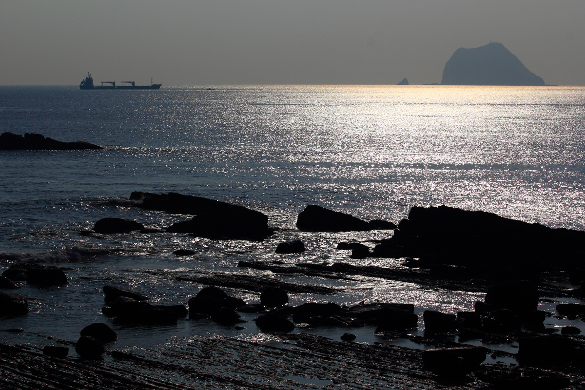 外木山